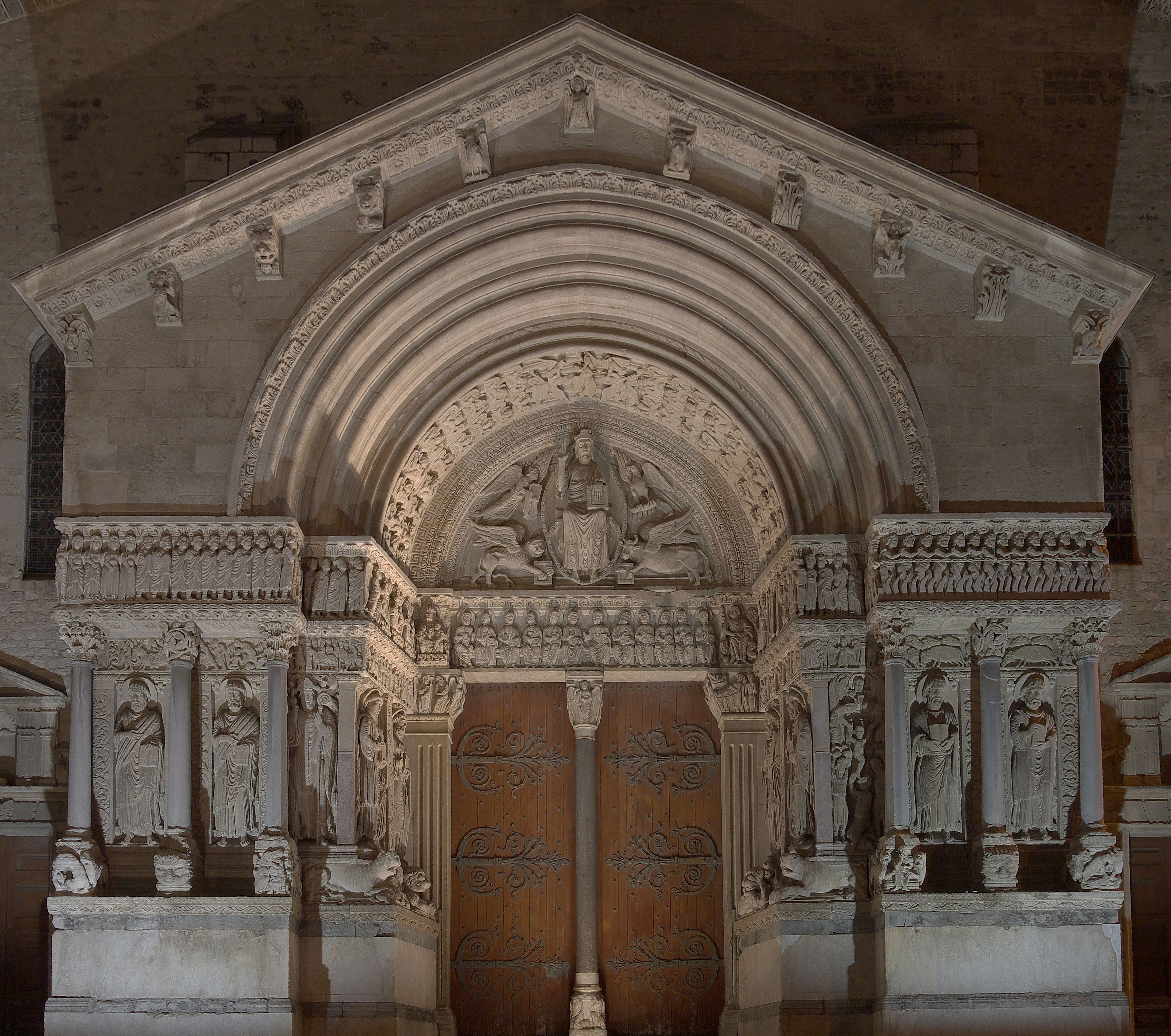 Ancienne Cathédrale Saint-Trophime d'Arles de nuit à Arles (France). Lumières par Éric Rolland Bellagamba en 1998.